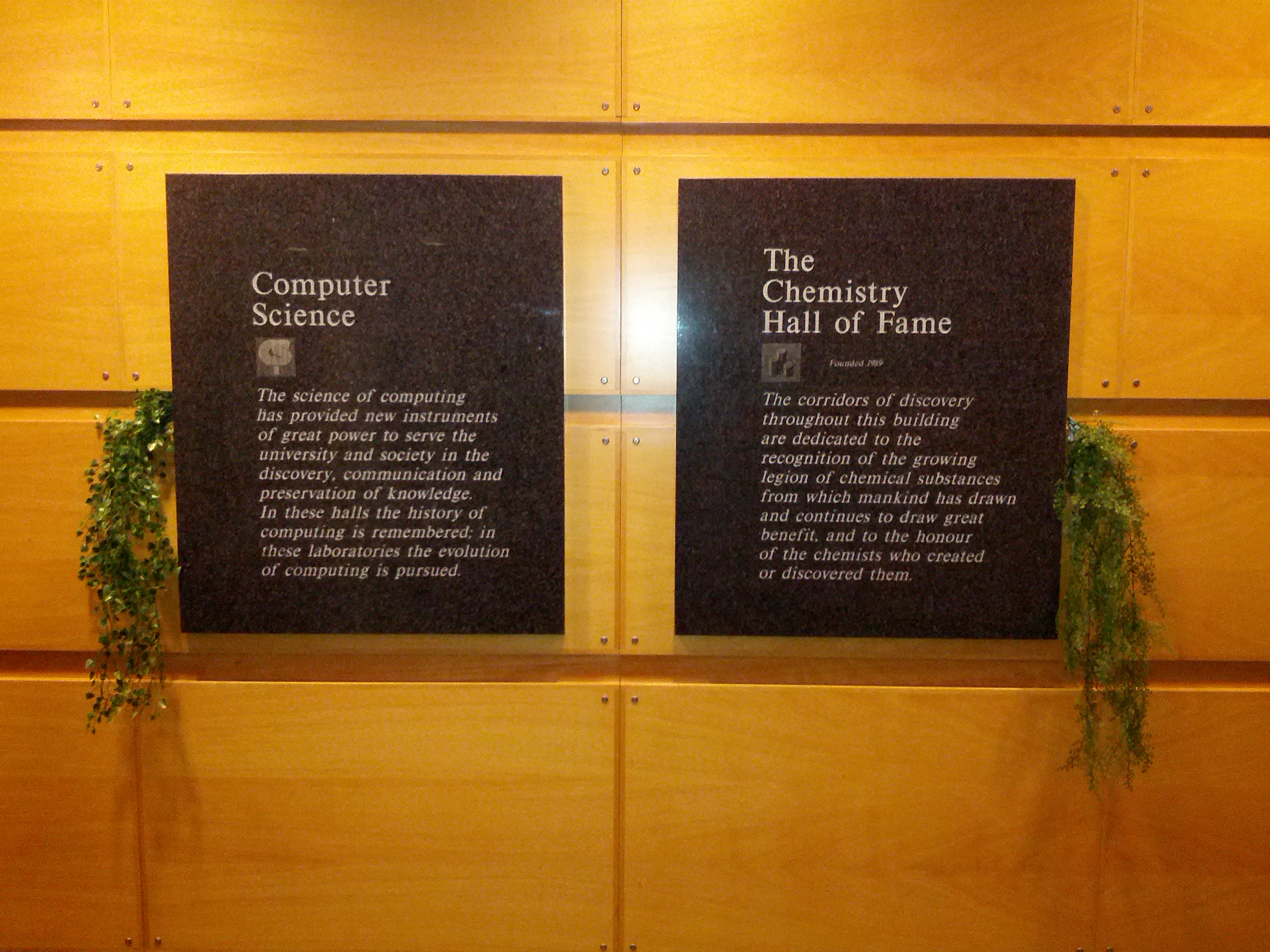 Placas dentro da York University.